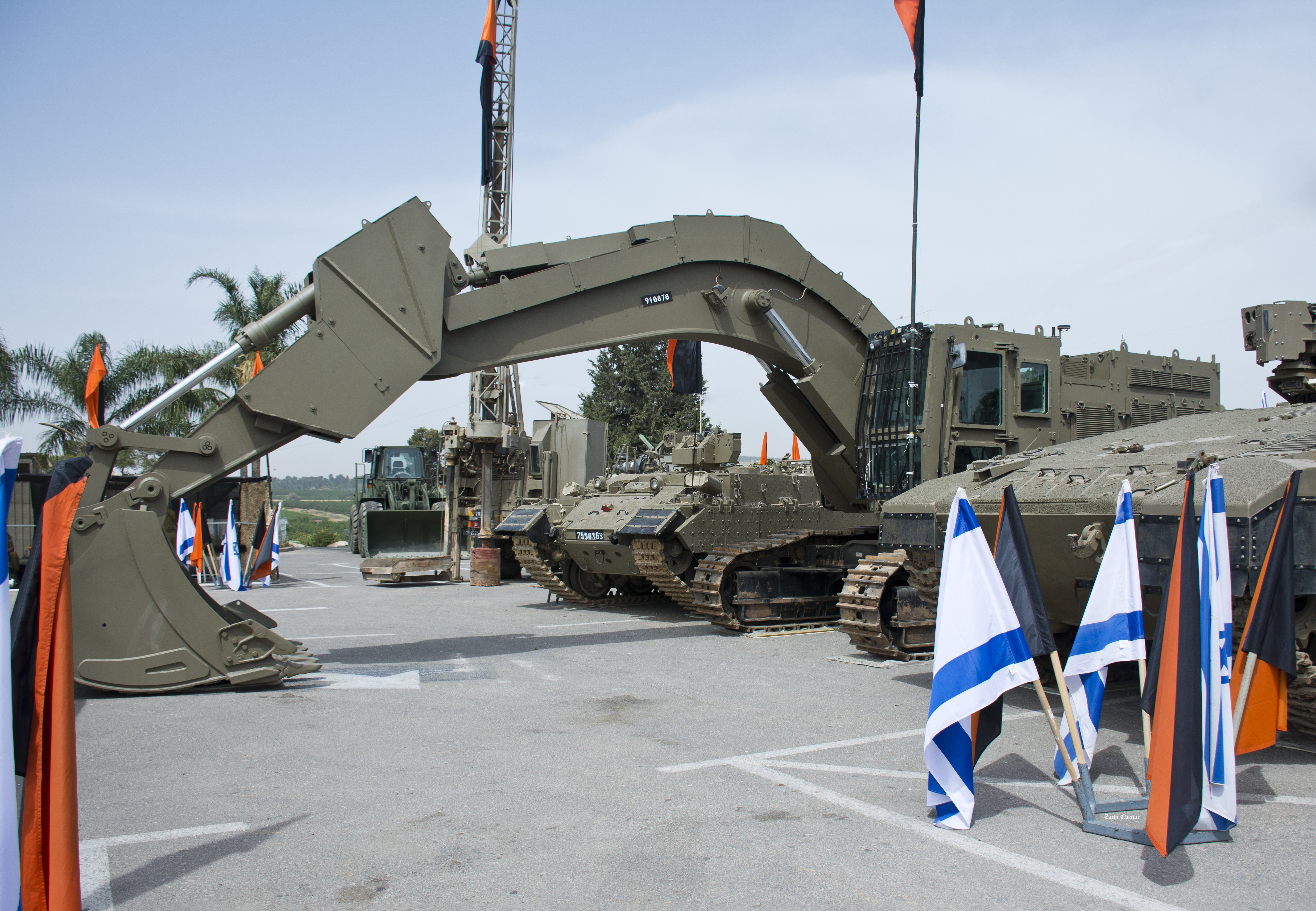 Armored Caterpillar Excavator (ACE), probably CAT 349E, used by the Israel Defense Forces Combat Engineering Corps for digging out underground tunnels and other combat engineering operations such as earthworks and demolishing multistory buildings. The ACE 349 is on display at "Yad LaShiryon" on Israel's Independence Day 2017 מחפר זחלי ממוגן של קטרפילר, כנראה מדגם קטרפילר 349, בשימוש חיל ההנדסה הקרבית לחשיפת מנהרות ומשימות הנדסה נוספות כגון עבודות עפר והריסת רבי-קומות. המחפר הממוגן - באגר 349 - מצולם כאן בתצוגת יום העצמאות 2017 ביד לשריון, ישראל